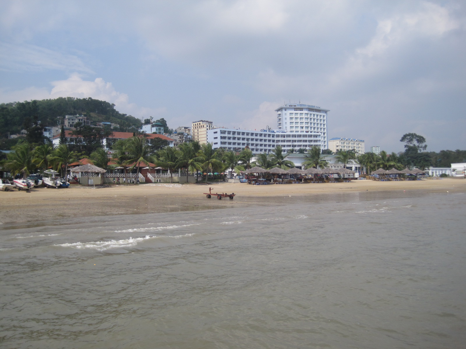 Ha Long Bay